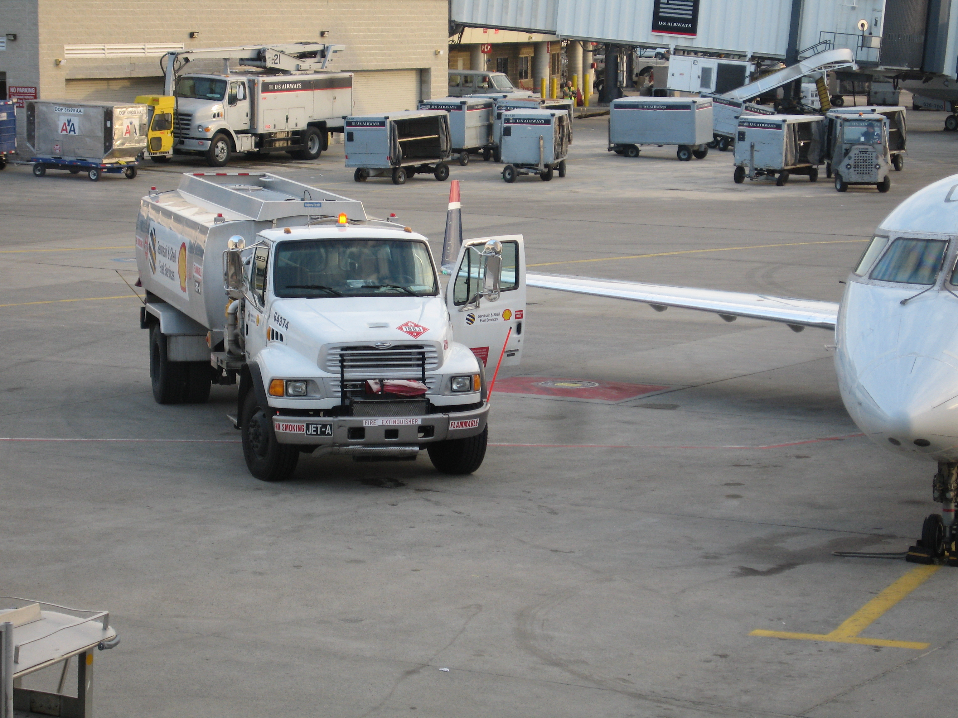 Sterling tank truck